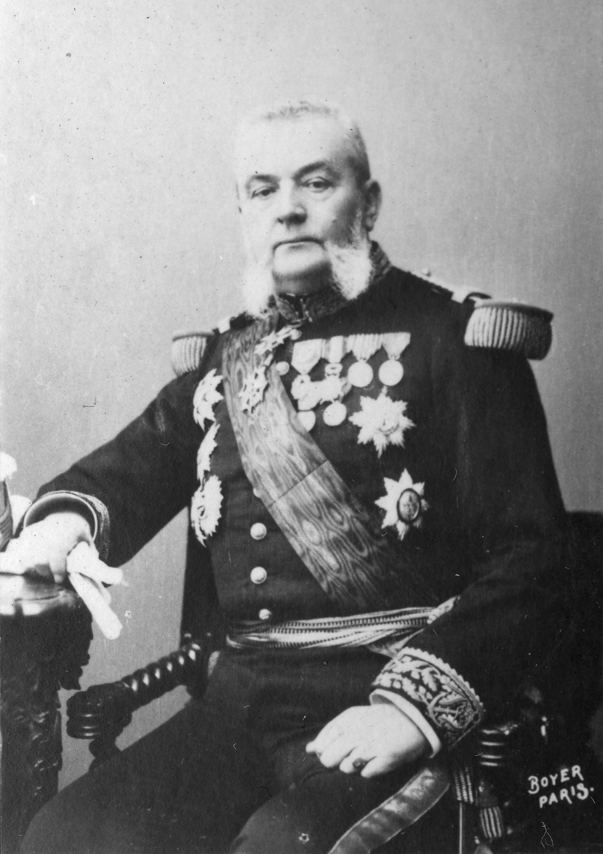 L'amiral Armand Gustave Besnard (1833-1903), préfet maritime de Brest (1893-1895), ministre de la Marine entre 1895 et 1898